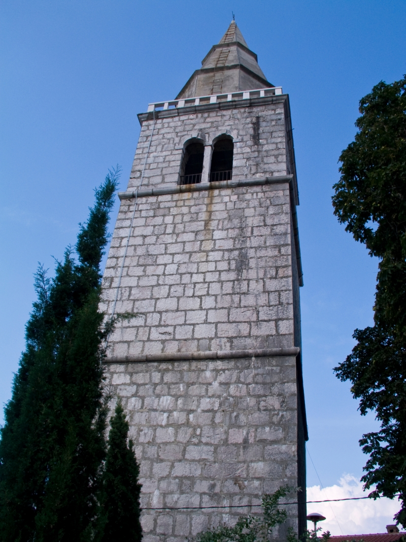 Zvonik crkve Svetog Stjepana u Dobrinju na otoku Krku